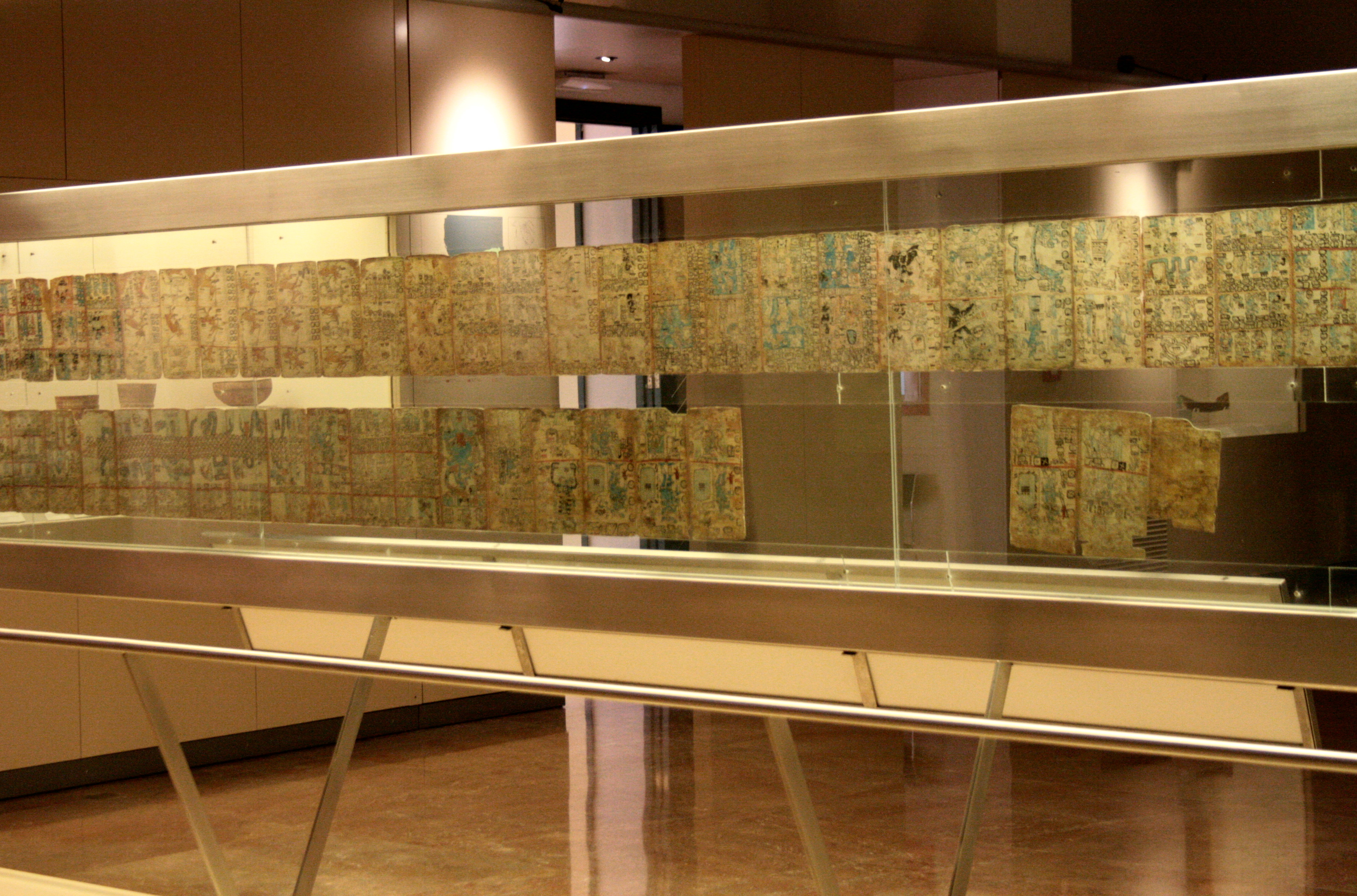 Codex de Madrid. Codex maya également connu sous le nom de Tro-Cortesianus. Origine inconnue. Epoque: Postclassique Récent. Museo de America, madrid, Espagne (copie)Unknown madrid codex. maya codex also known as tro-cortesianus. origin unknown. epoch: late postclassic. museo de america, madrid, spain (replica)